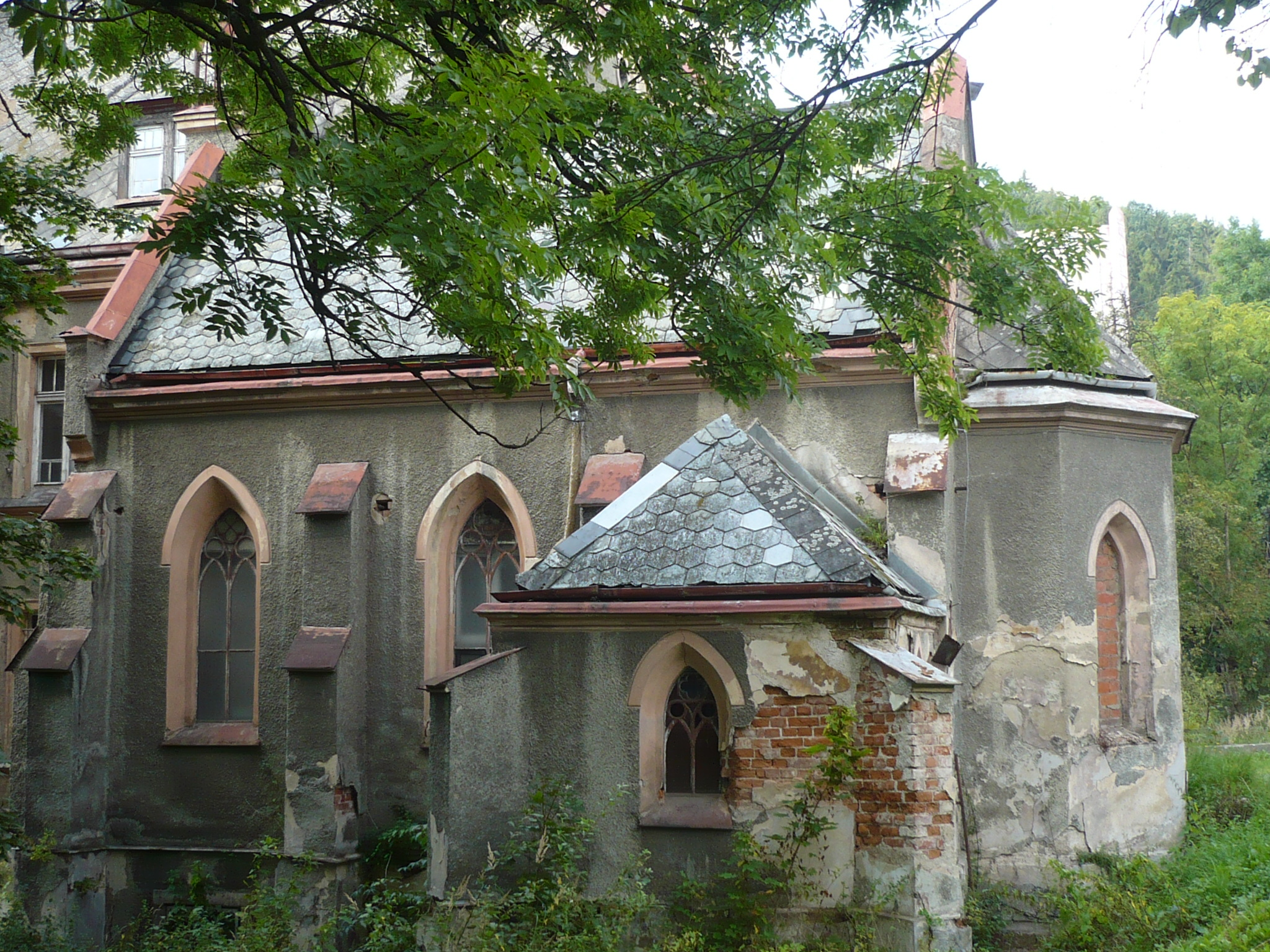 Nowa Ruda. ul. Marszałka Józefa Piłsudskiego 16 - szpital miejski, 1879, 1908, 1912